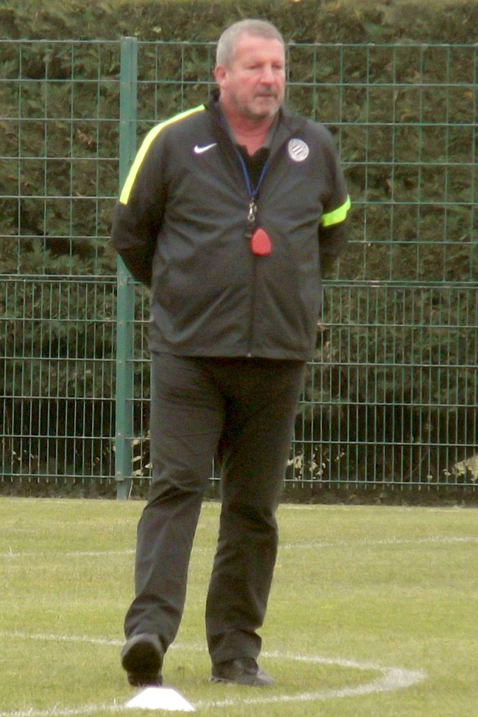 Rolland Courbis, décembre 2013.